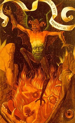 In der Hölle gibt es keine Erlösung. in inferno nulla est redemptio.